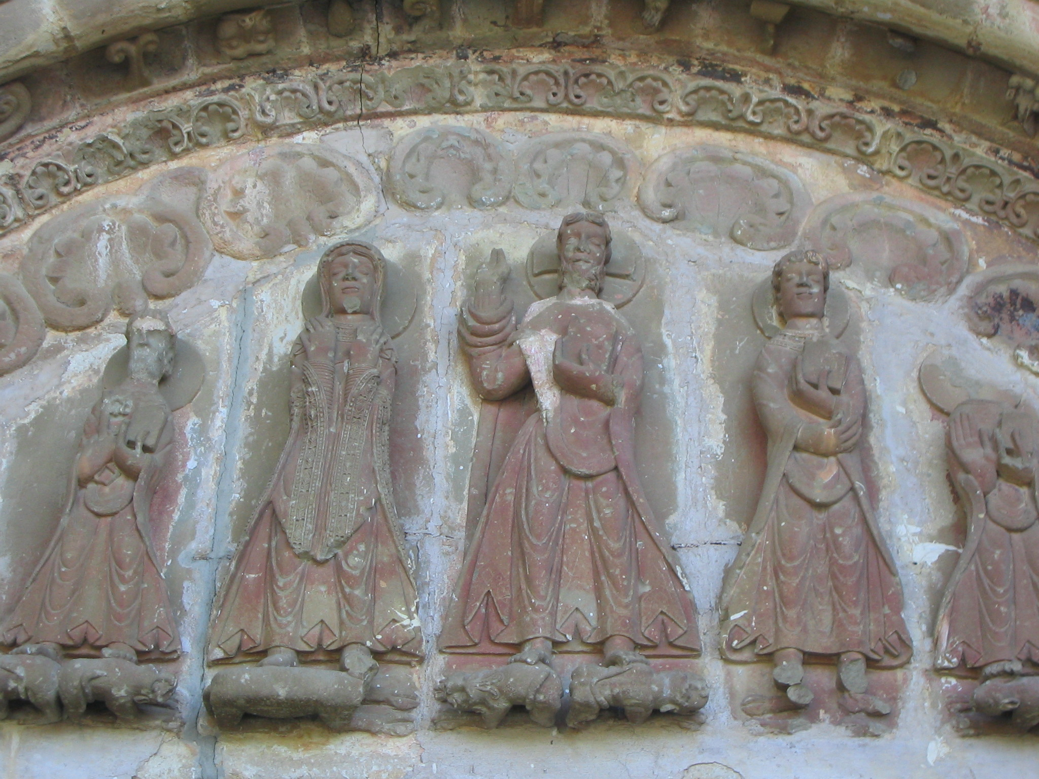 Monasterio de Leyre, porta Speciosa, Yesa, Navarra (España).